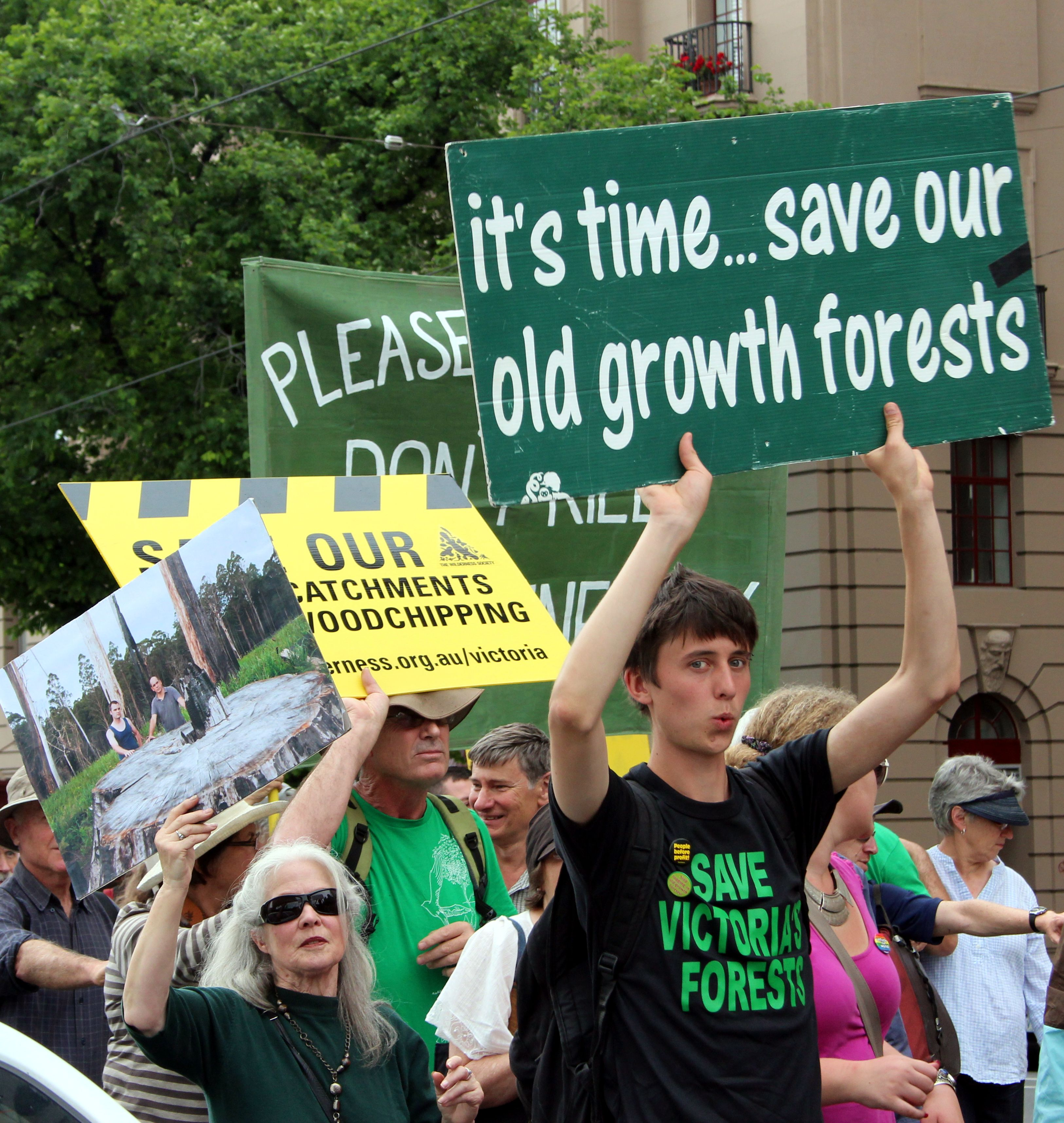 Une marche de protestation est organisée le 13 novembres 2011 par plusieurs organisations écologistes (Environment Victoria, The Wilderness Society, Victorian National Parks Association et Les Amis de la Terre) afin d'interpeller Ted Baillieu sur les mesures du gouvernement convernant les questions environnementales.